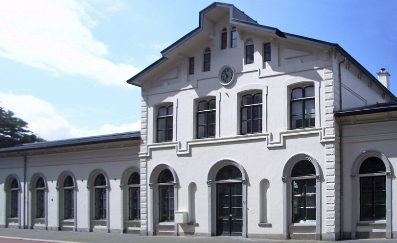 Het voormalige NCS-station in Amersfoort